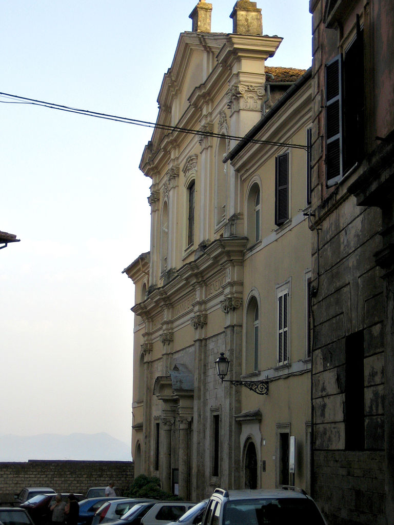 Anagni, Lazio, Italia